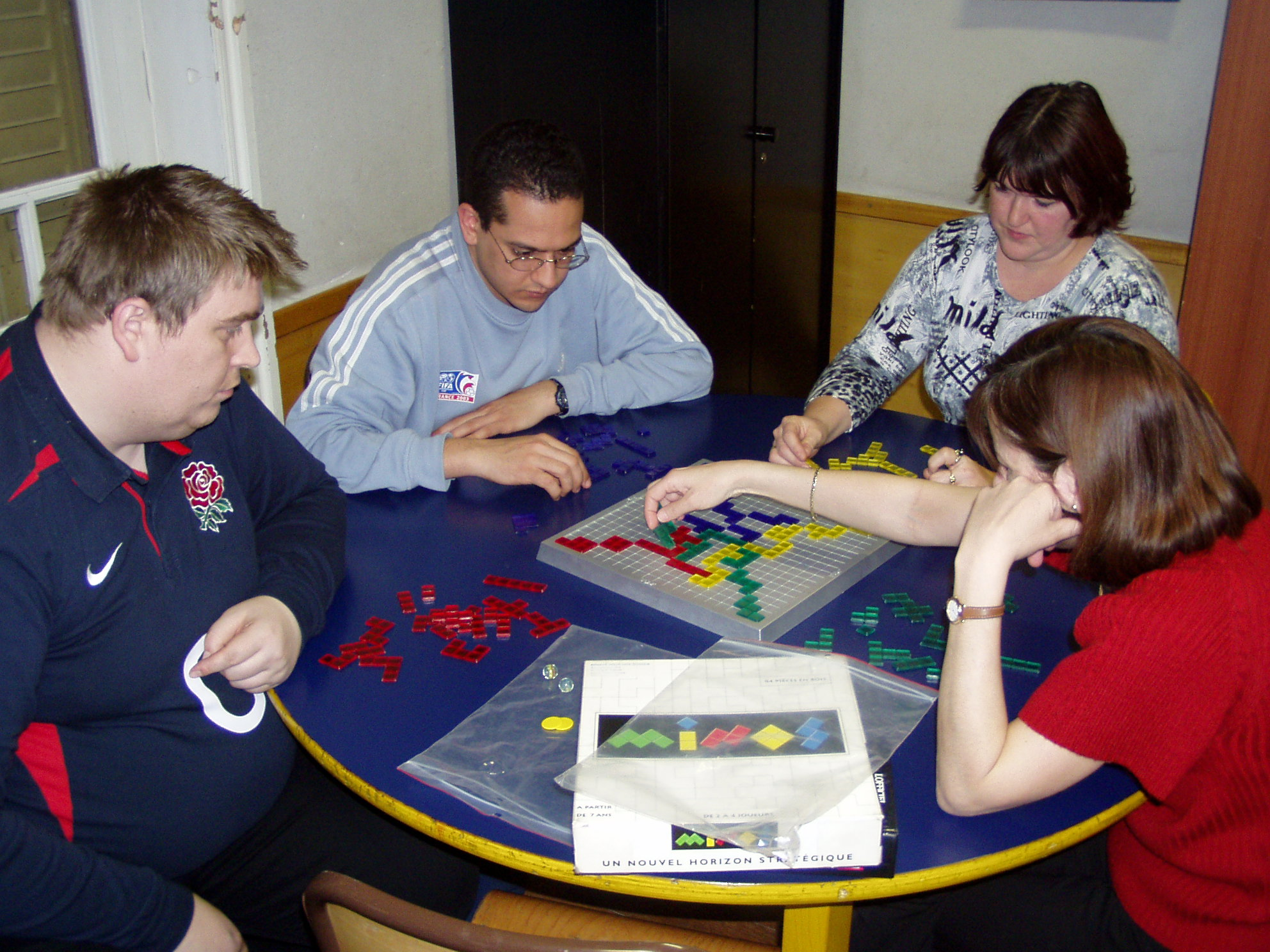 La première version (Minos) à coté de la version finale (Blokus)